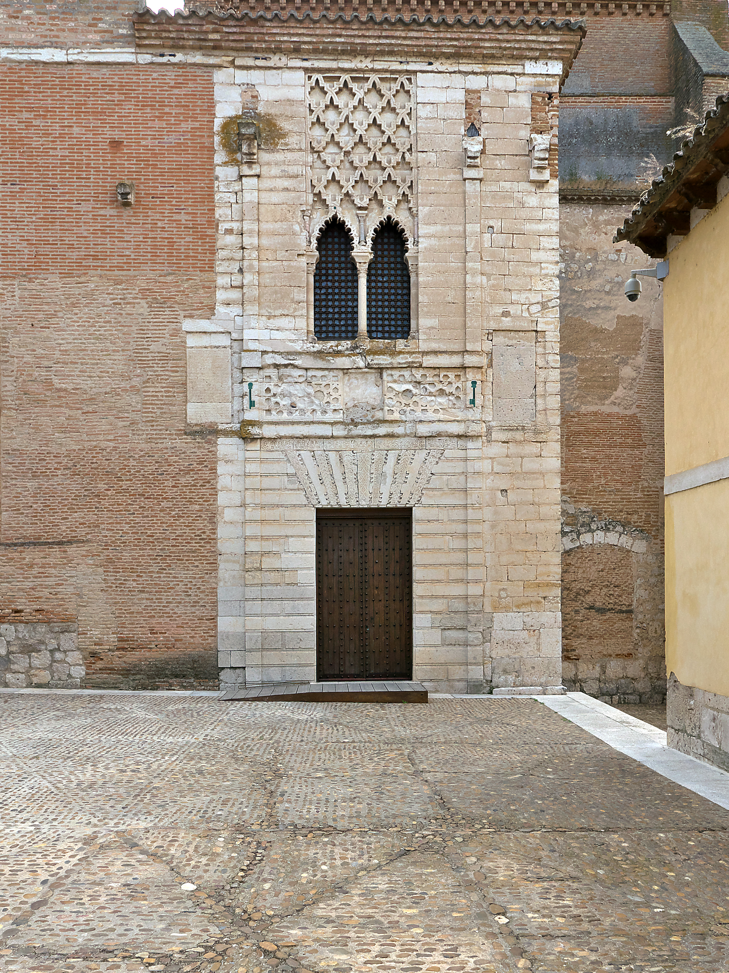 Portada de piedra, principal del palacio iniciado por Alfonso XI (1350-1354) y terminado por Pedro I en 1360. Es posible la autoría de un taller mudéjar de Alfonso XI, que trabajó en el Palacio del Yeso del Real Alcázar de Sevilla. Monumental portada de misma lectura que los otros palacios de Pedro I, Astudillo y Sevilla. Portada del Palacio de doña María de Padilla, Astudillo (Palencia) Portada del Palacio de Pedro I, Real Alcázar de Sevilla